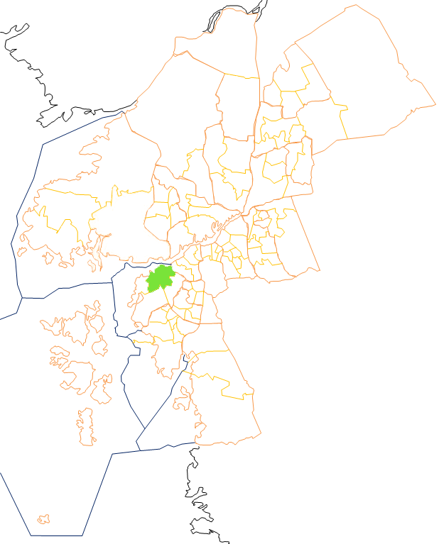 Karta som visar primärområdes belägenhet i Göteborg